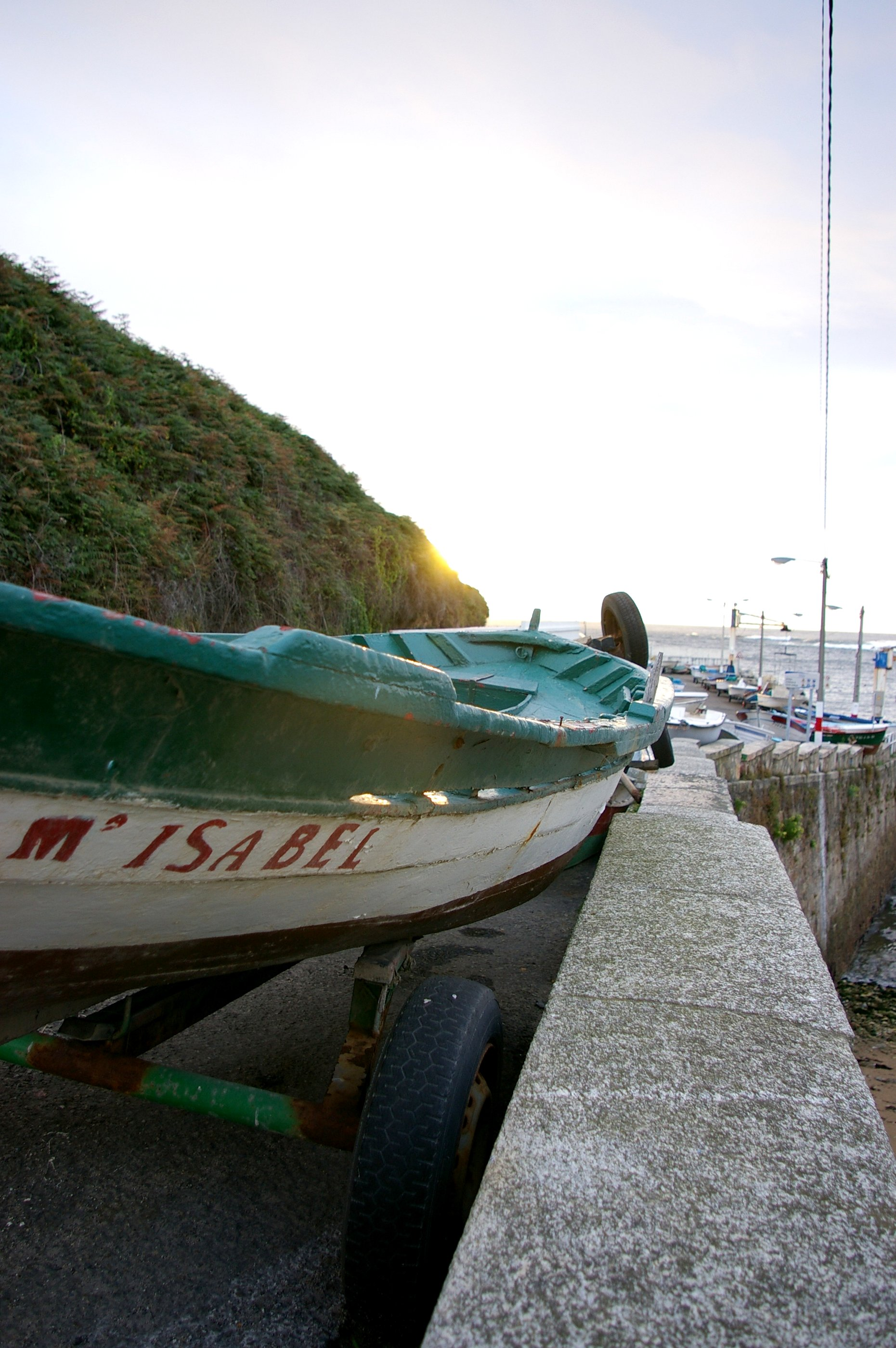 Puesta de sol desde O Portiño (A Coruña).